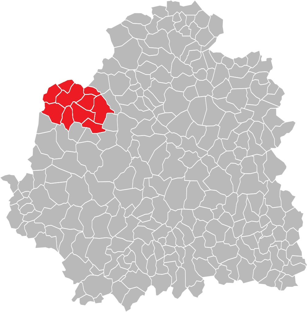 Carte des communes de l'Indre (36) : Le canton de Châtillon-sur-Indre, de 1790 à 2015.